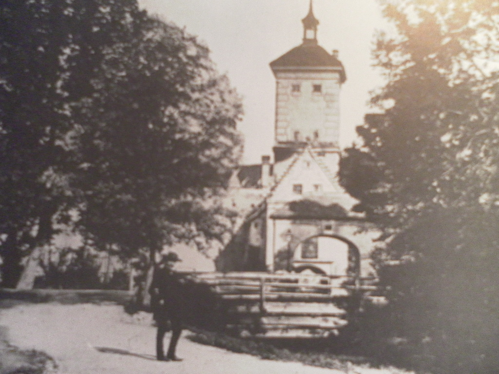 Das Schwibbogentor